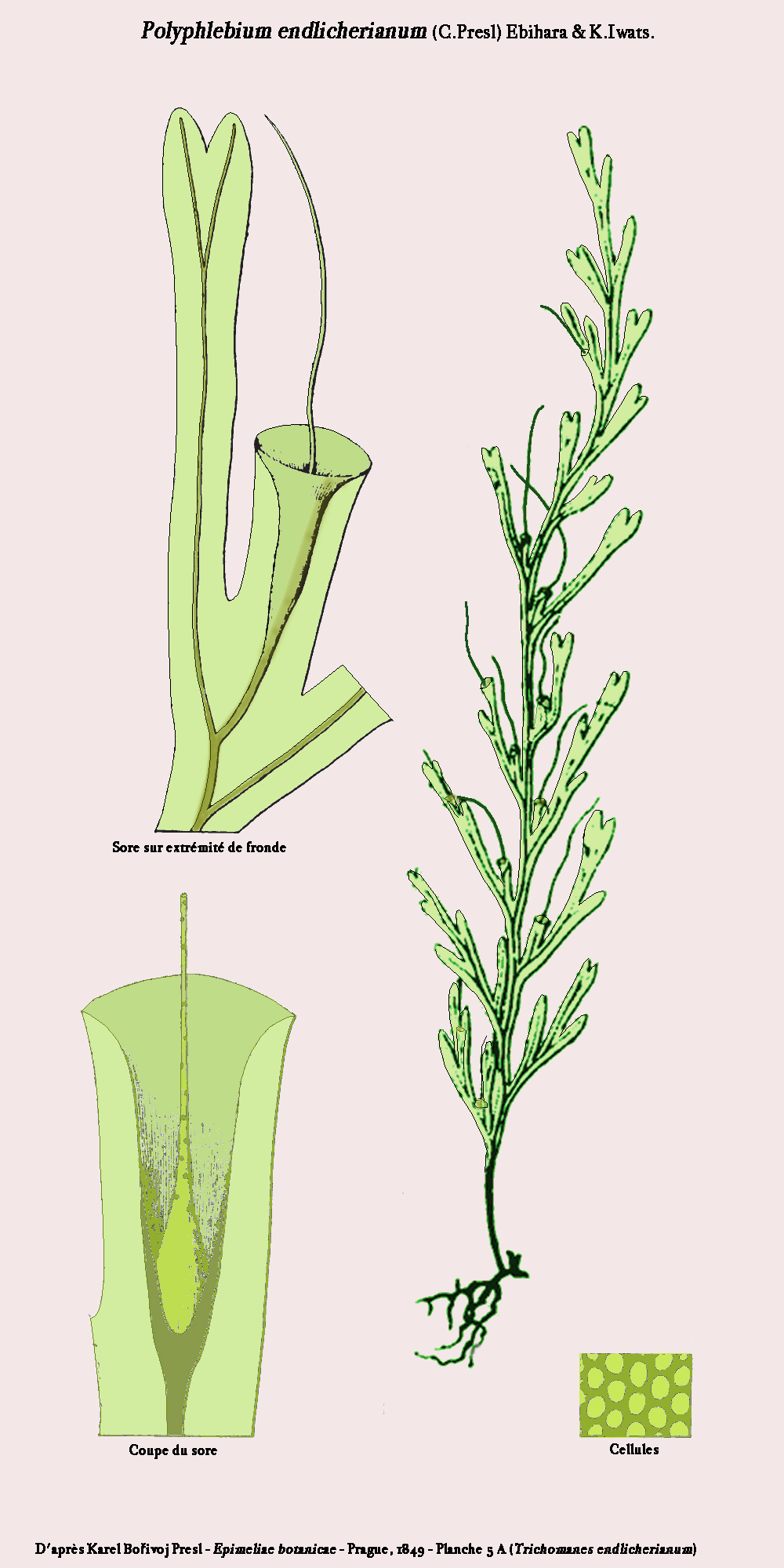 Polyphlebium endlicherianum (Trichomanes endlicherianum) - Planche de Karel Bořivoj Presl - Epimeliae botanicae - Reprise par D.Prévôt